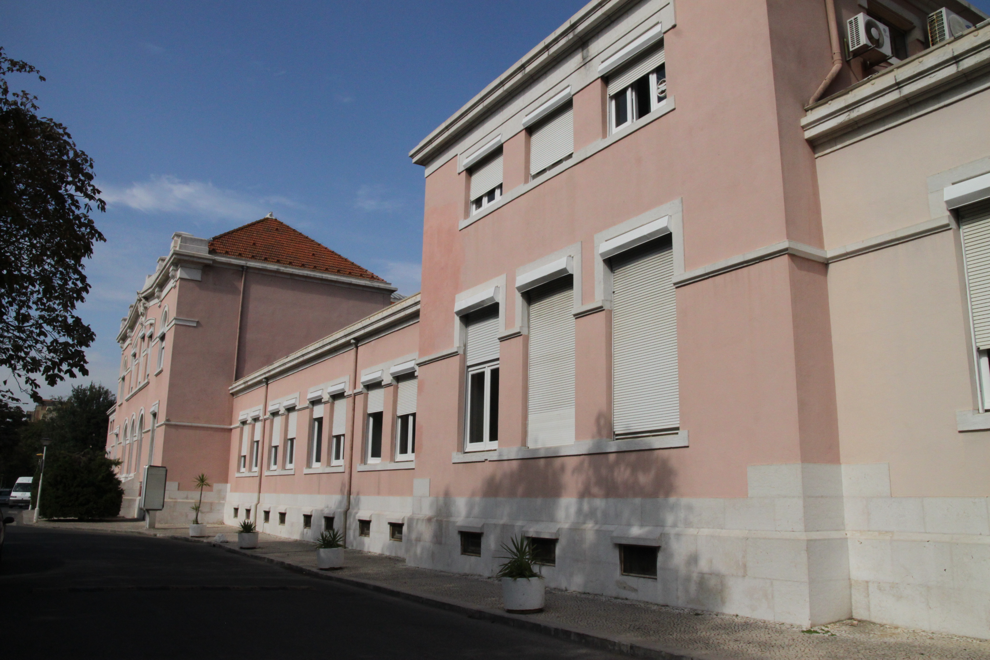 Hospital Júlio de Matos This file was uploaded for Wiki Loves Monuments in Portugal with the unique identifier 97005051.